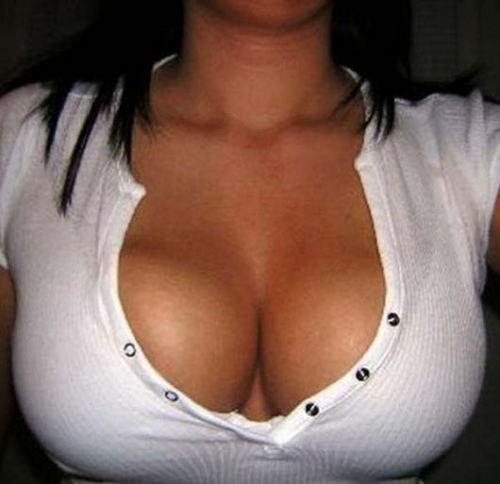 Cleavageca vas ca